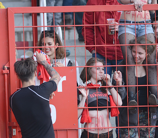 Christopher Trimmel verschenkt sein Trikot